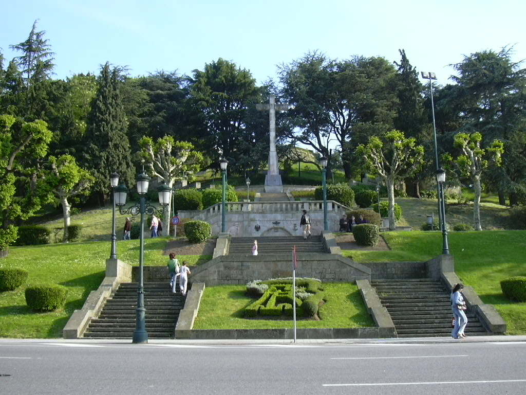 A entrada do Parque do Castro em Vigo, maio de 2006.